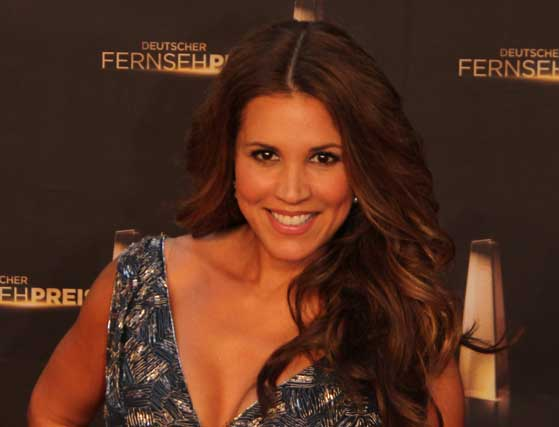 Karen Webb beim Deutschen Fernsehpreis 2012